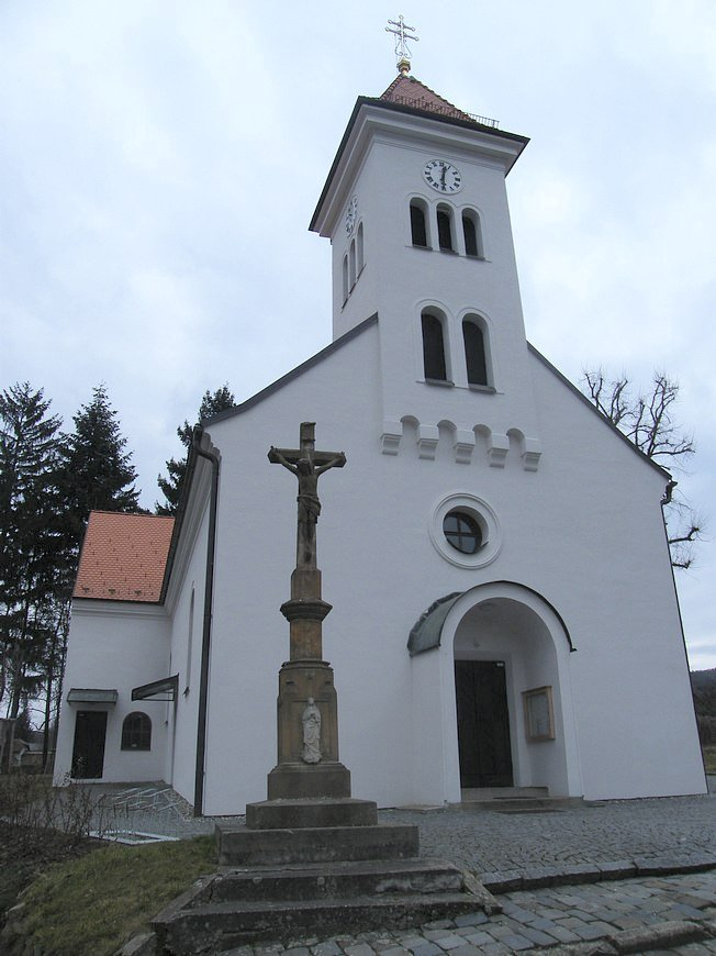 Kostel sv. Bartoloměje, Březnice u Zlína